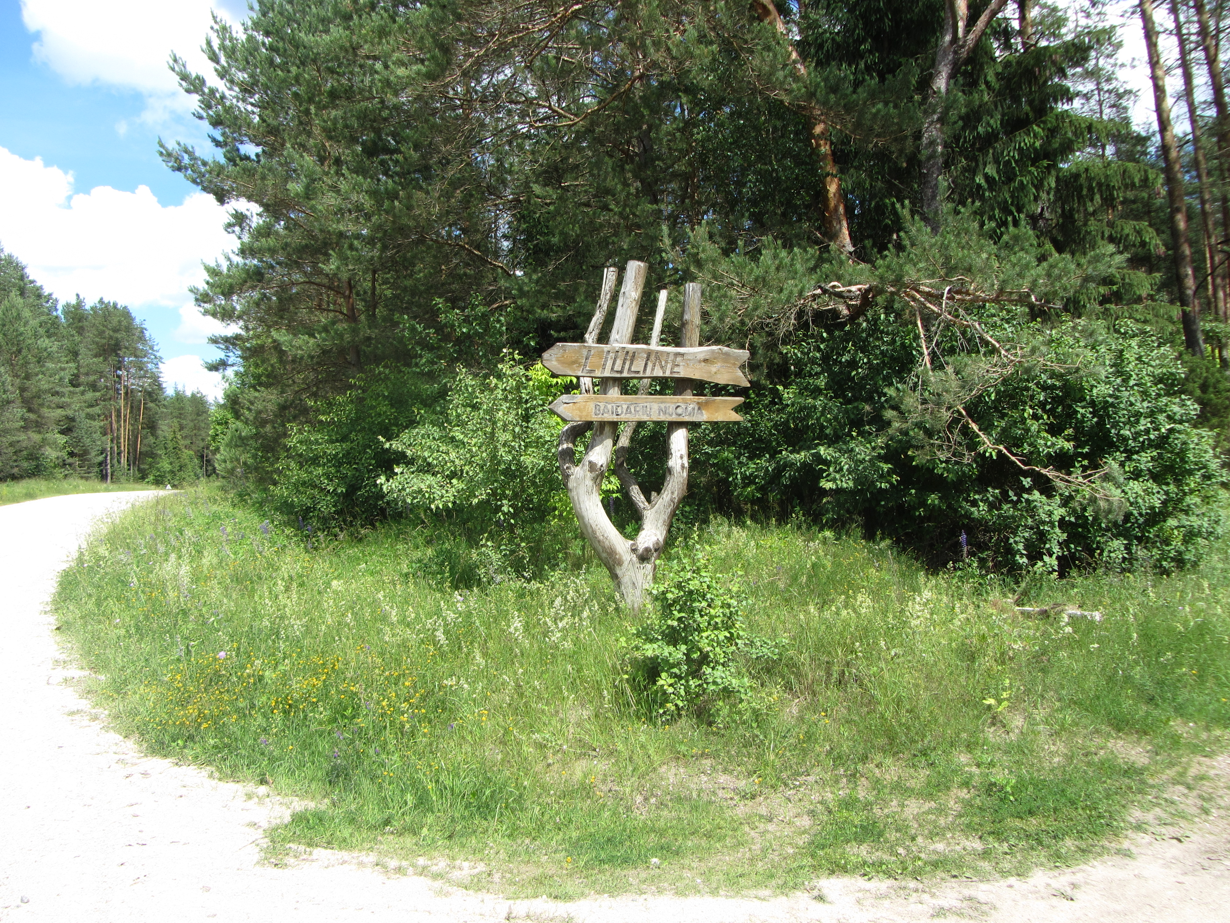 Sarių sen., Lithuania